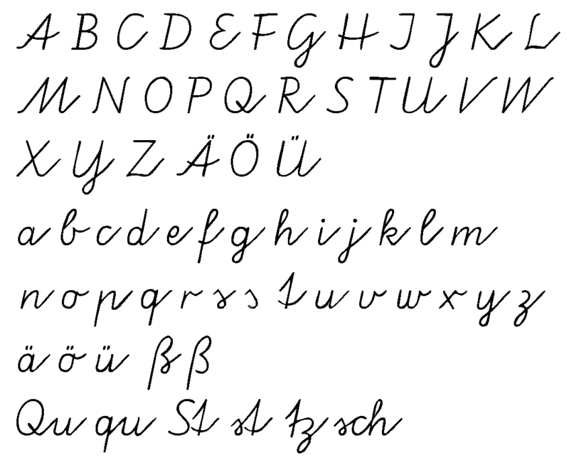 Alphabet der Vereinfachten Ausgangsschrift.